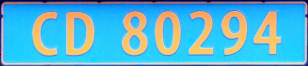 Diplomatskilt. 80 tilhørende Tyskland.